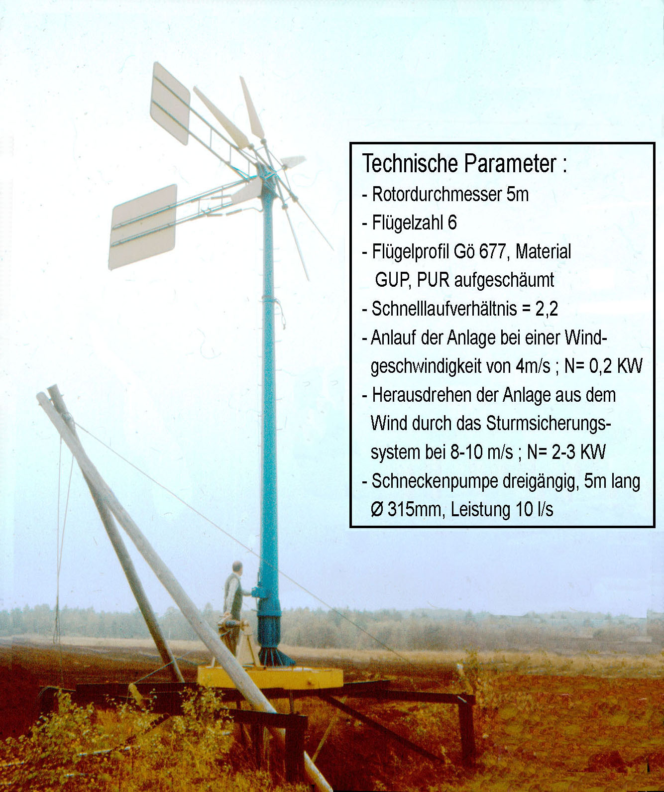 Windkraftgetriebenes Schöpfwerk im BT Breesen (Konstrukteur: Dr. Pinzke)